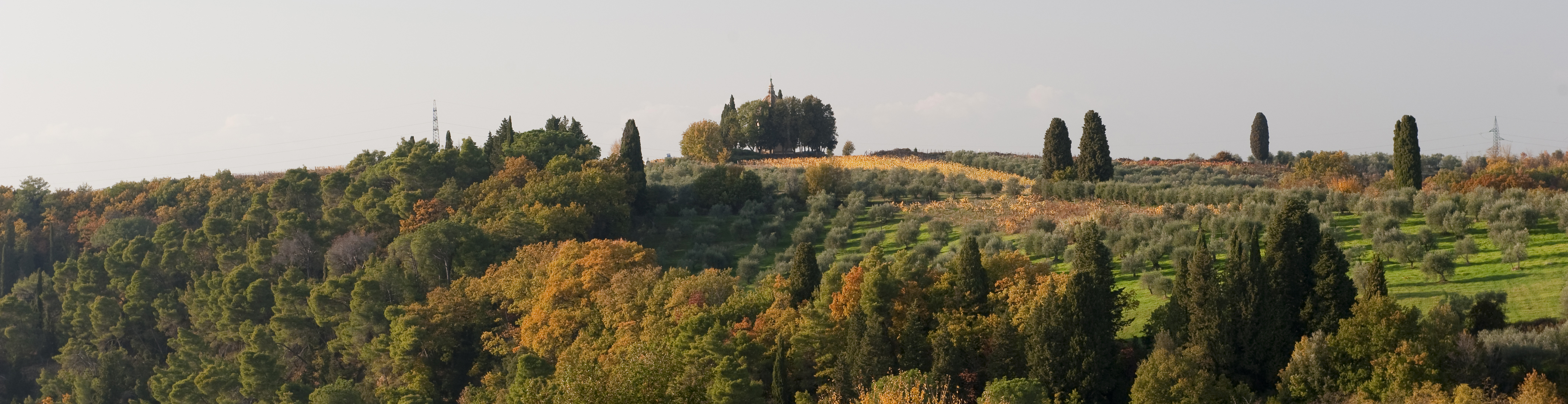 Panoramica de colle di Semifonte, Barberino Val d'Elsa